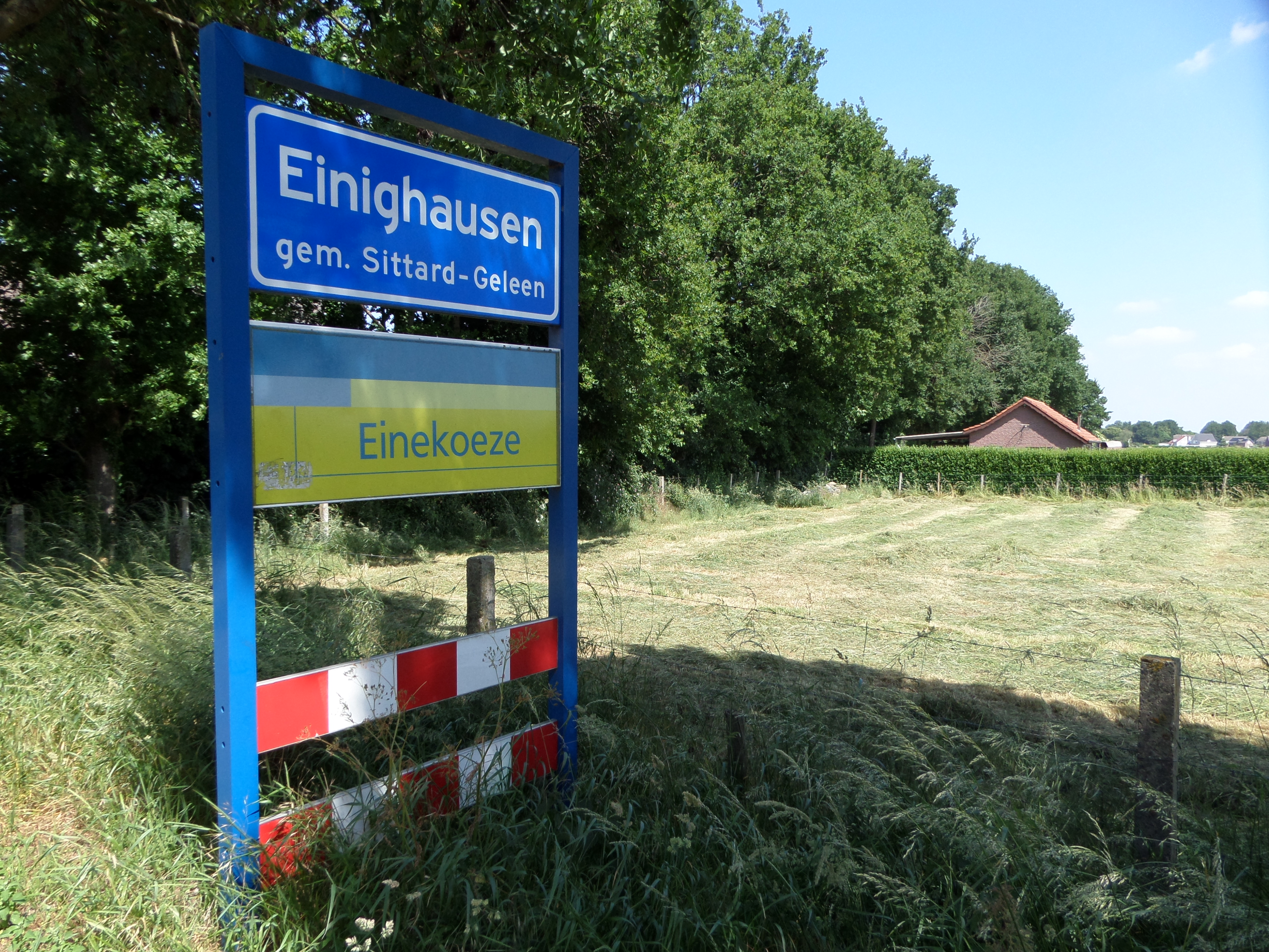 Plaatsnaambord van Einighausen in de Nederlandse gemeente Sittard-Geleen, provincie Limburg